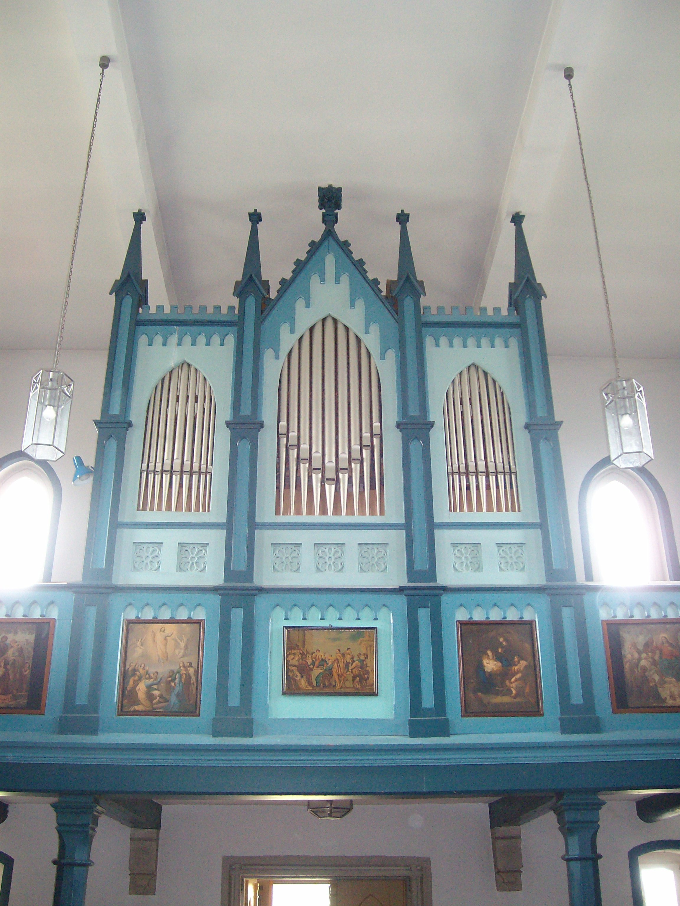 Evangelische Kirche Röthges, Laubach, Landkreis Gießen, Hessen, Deutschland